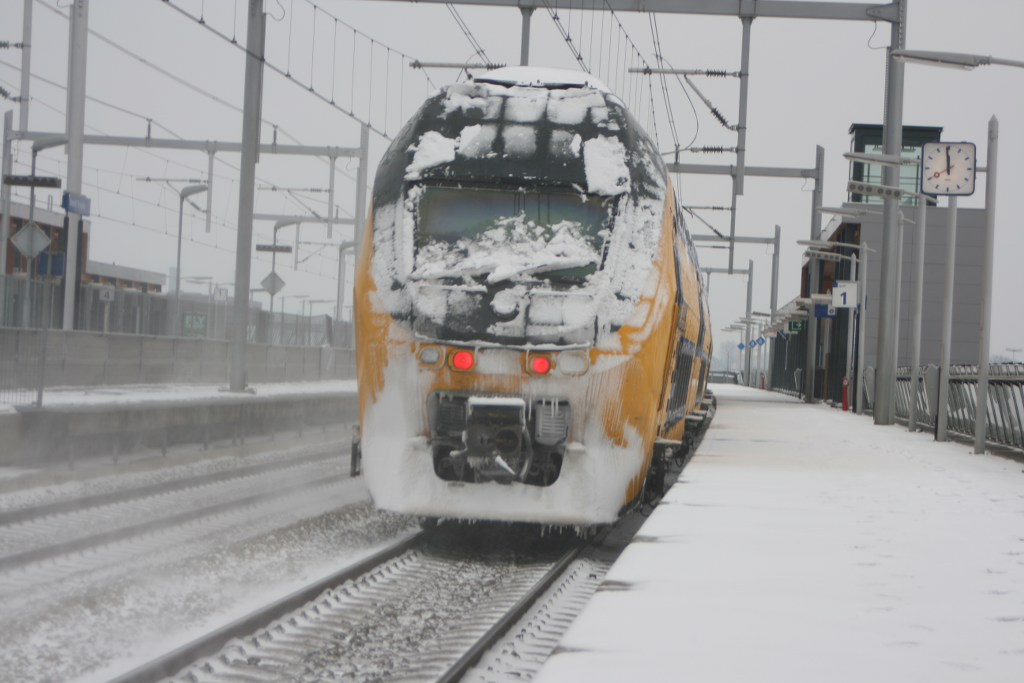 Bevroren trein passeert Utrecht Terwijde.